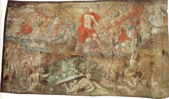 Millstätter Fastentuch, Weltgerich (nach Matthäus 25,31-33); gemalt von/painted by Oswalt Kreusel 1593